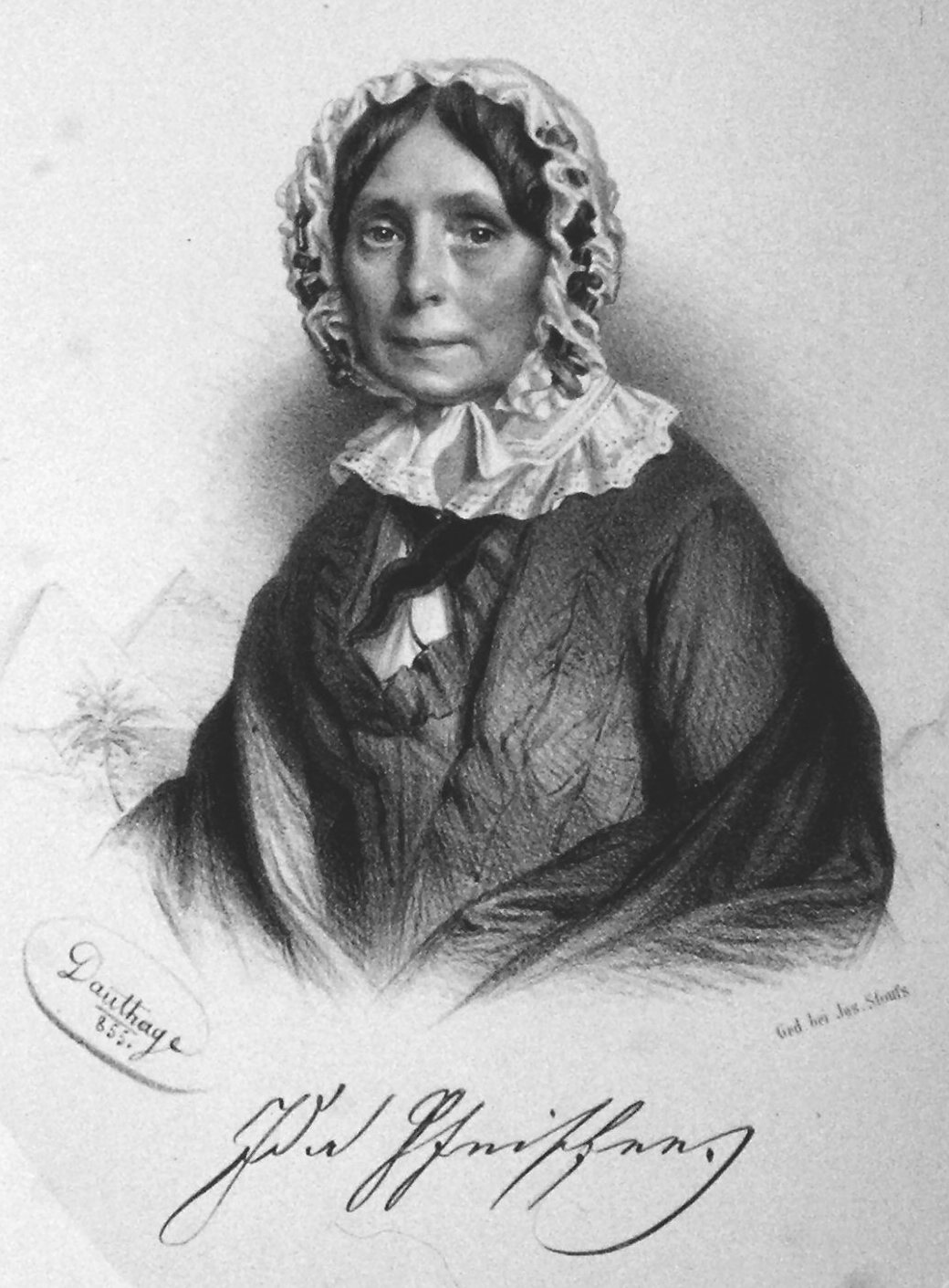 Ida Pfeiffer (1797-1858), österreichische Reisende. Lithographie von Adolf Dauthage. 1855